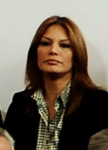 Presentadora venezolana Yvonne Reyes